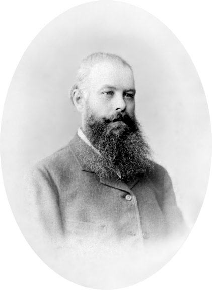 Василий Васильевич Докучаев